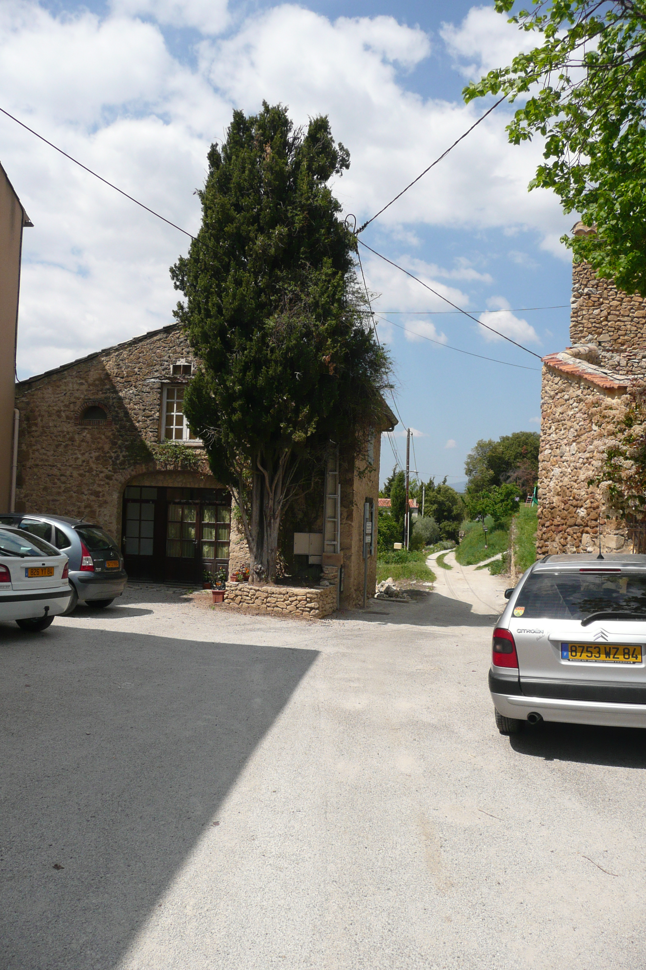 Arrêt brusque de la ville (goudron à chemin de terre) à Puyméras.